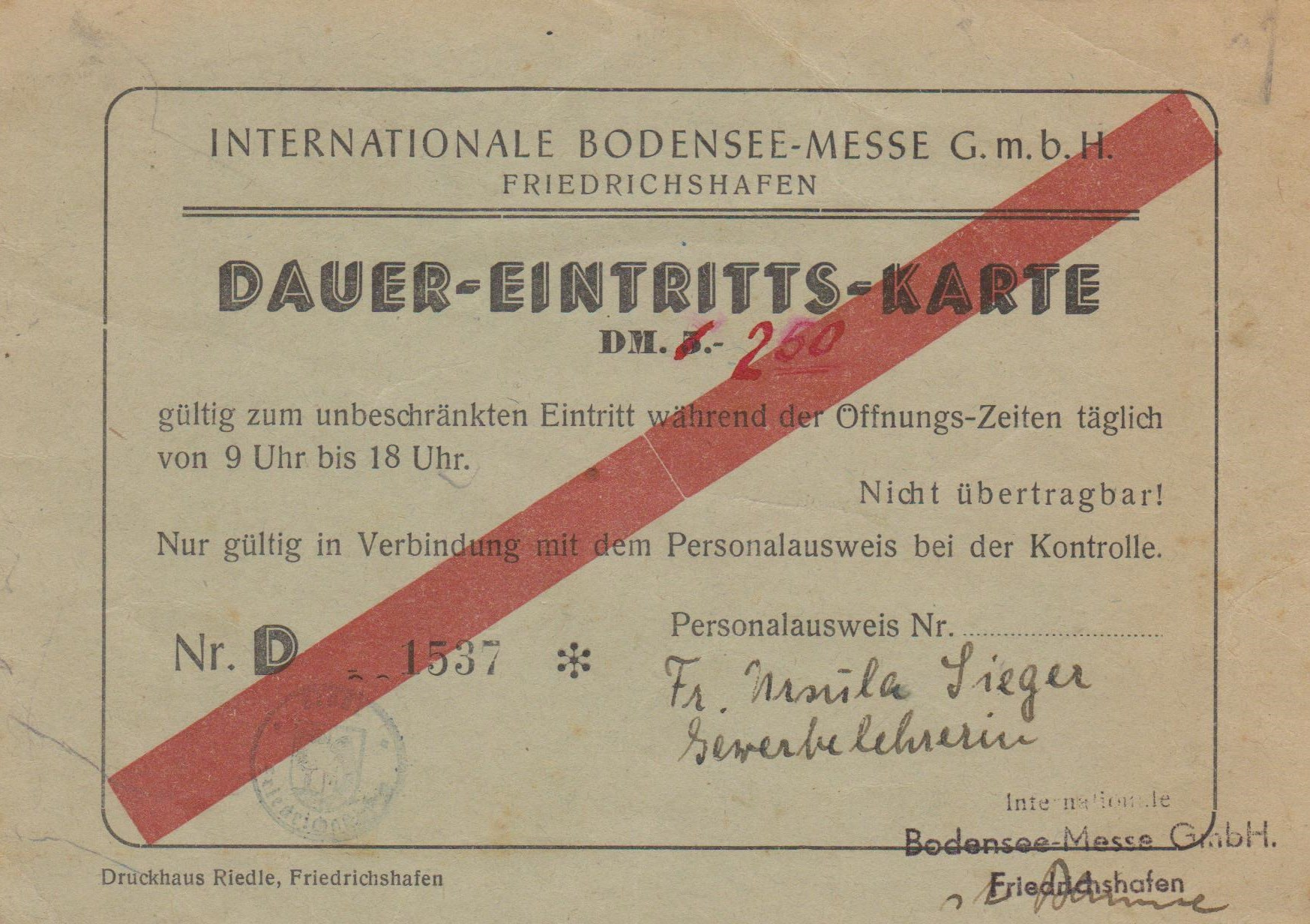 Deutschland - Baden-Württemberg - Bodenseekreis - Friedrichshafen: Dauer-Eintritts-Karte der Internationalen Bodensee-Messe